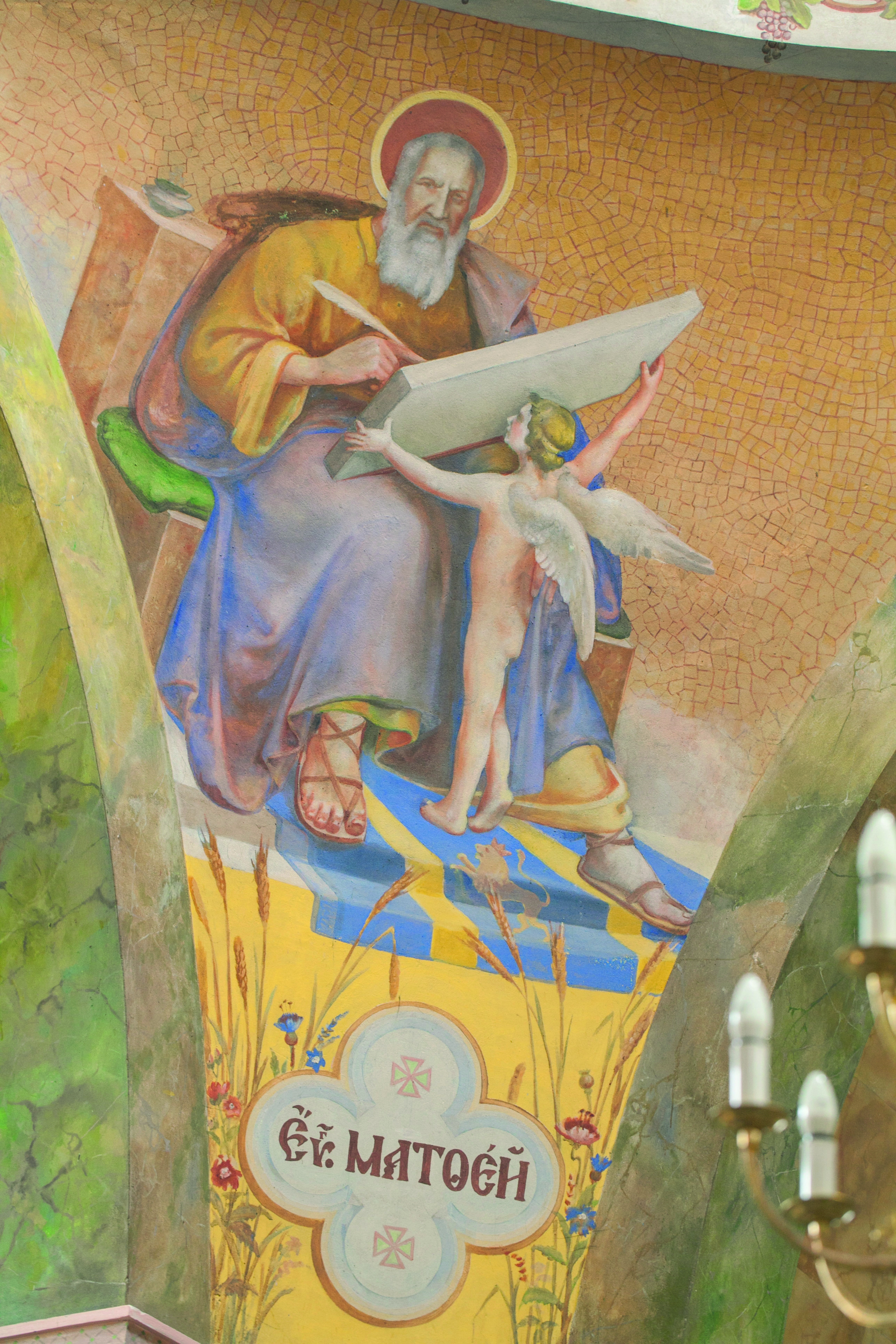 Фрагмент розписів церква св.Юрія у Чесанові (Фото 2016) - Кузневич